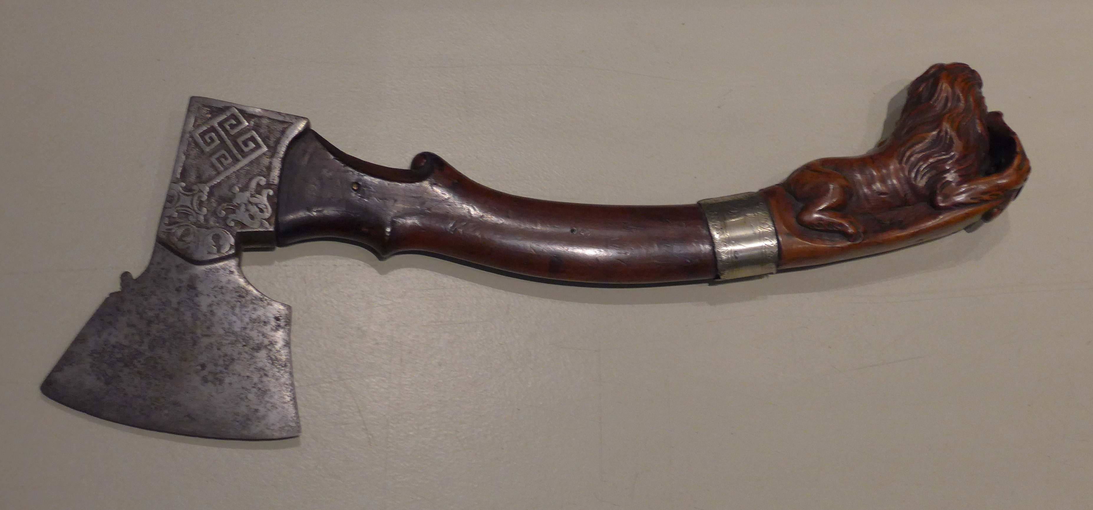 Amtsbeil des Schlachtevogts in Bremen, 18. Jahrhundert, Focke-Museum Bremen